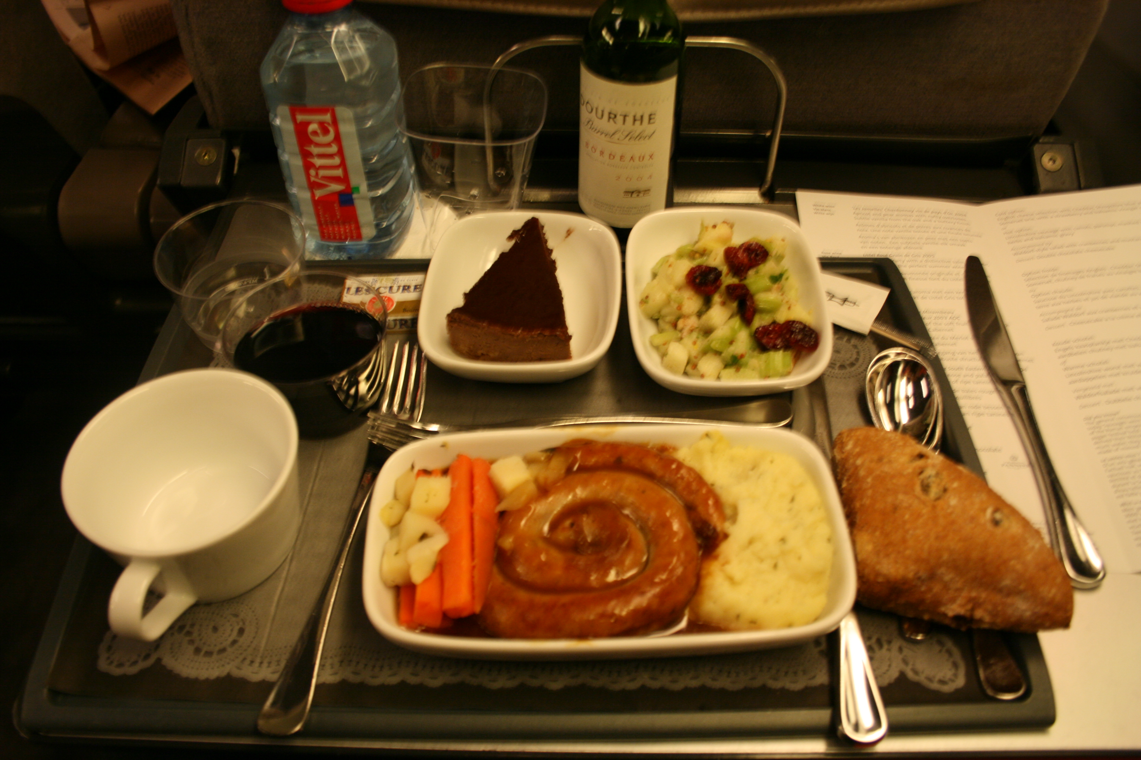 Lincolnshire sausage dinner - Eurostar Cuisine(!)